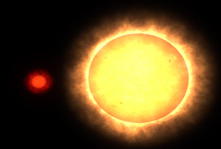 紅矮星與太陽的大小